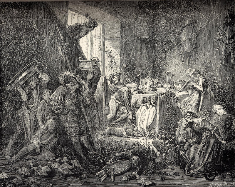 Illustration for Charles Perrault's La Belle au Bois Dormant from Histoires ou Contes du Temps passé: Les Contes de ma Mère l'Oye (1697). Gustave Doré's illustrations appear in an 1867 edition entitled Les Contes de Perrault. Fifth of six engravings